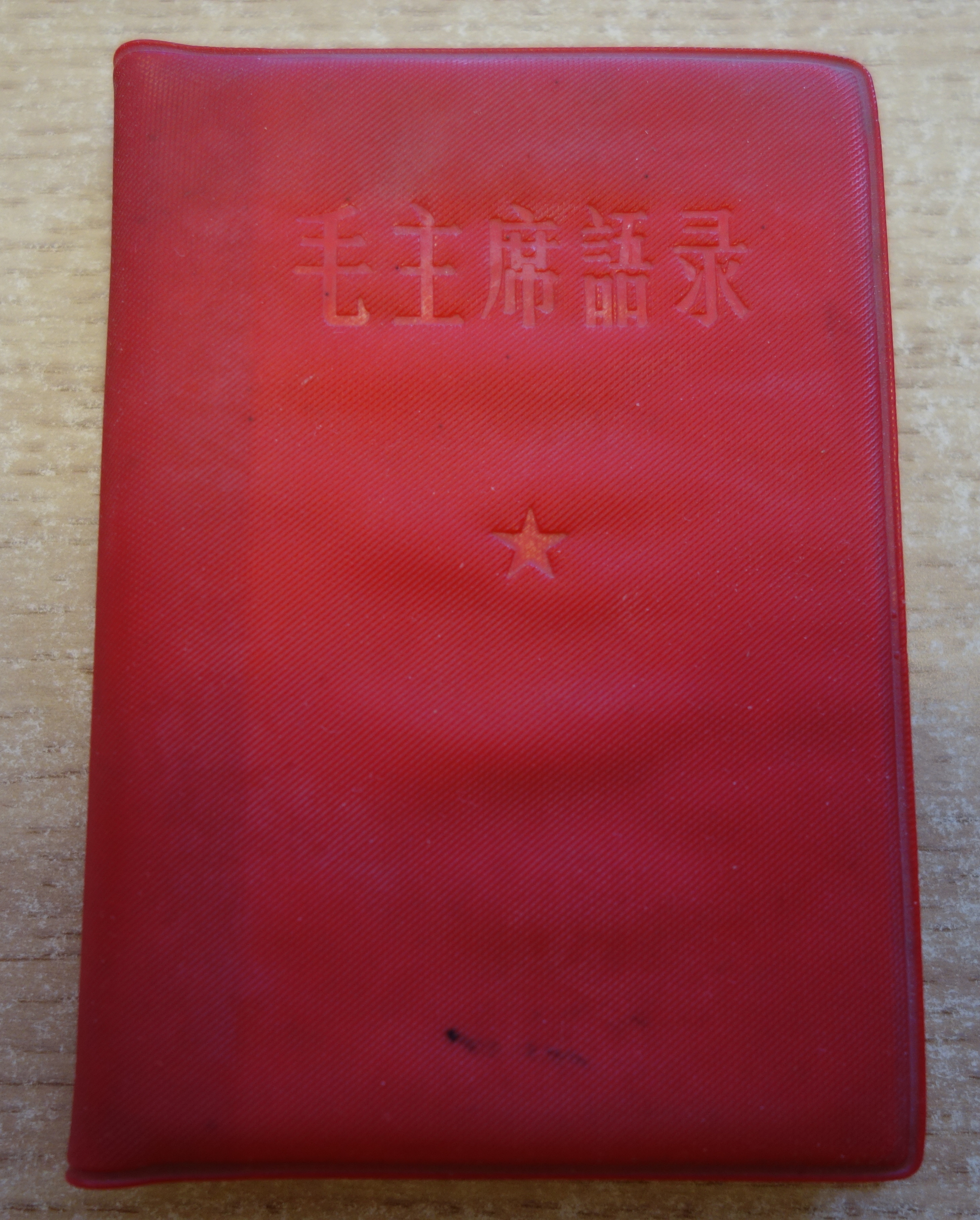 中文（中国大陆）: 1967年8月，由中国人民解放军总政治部编印，北京胶印厂印刷的《毛主席语录》封面